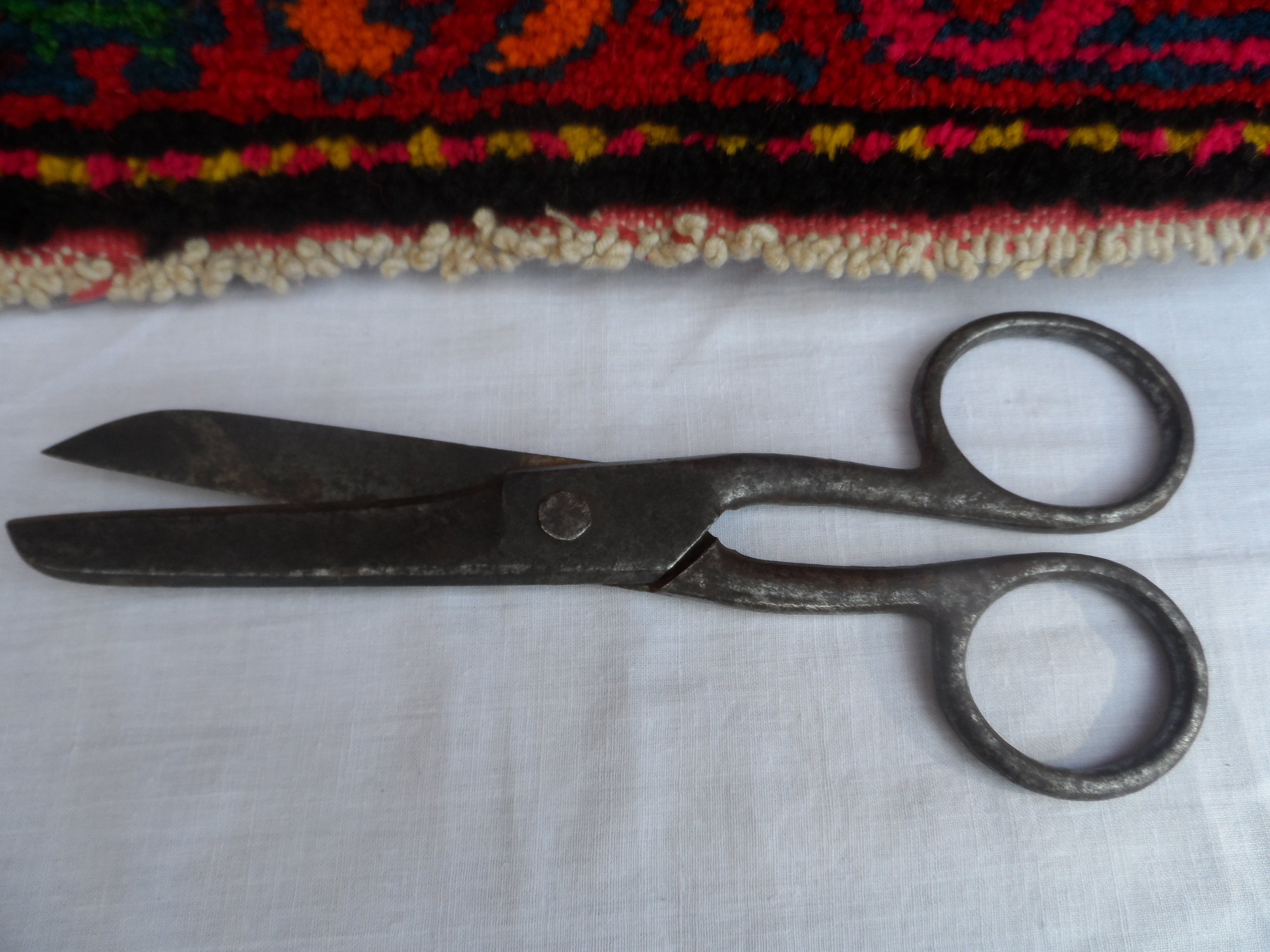 Xalça qayçısı — xalça, palaz və digər xalça məmulatlarını toxuyarkən ilmələr döylüb yerində bərkidildikdən sonra onların ucunun eyni ölçüdə kəsilməsində istifadə edilən metal alət.